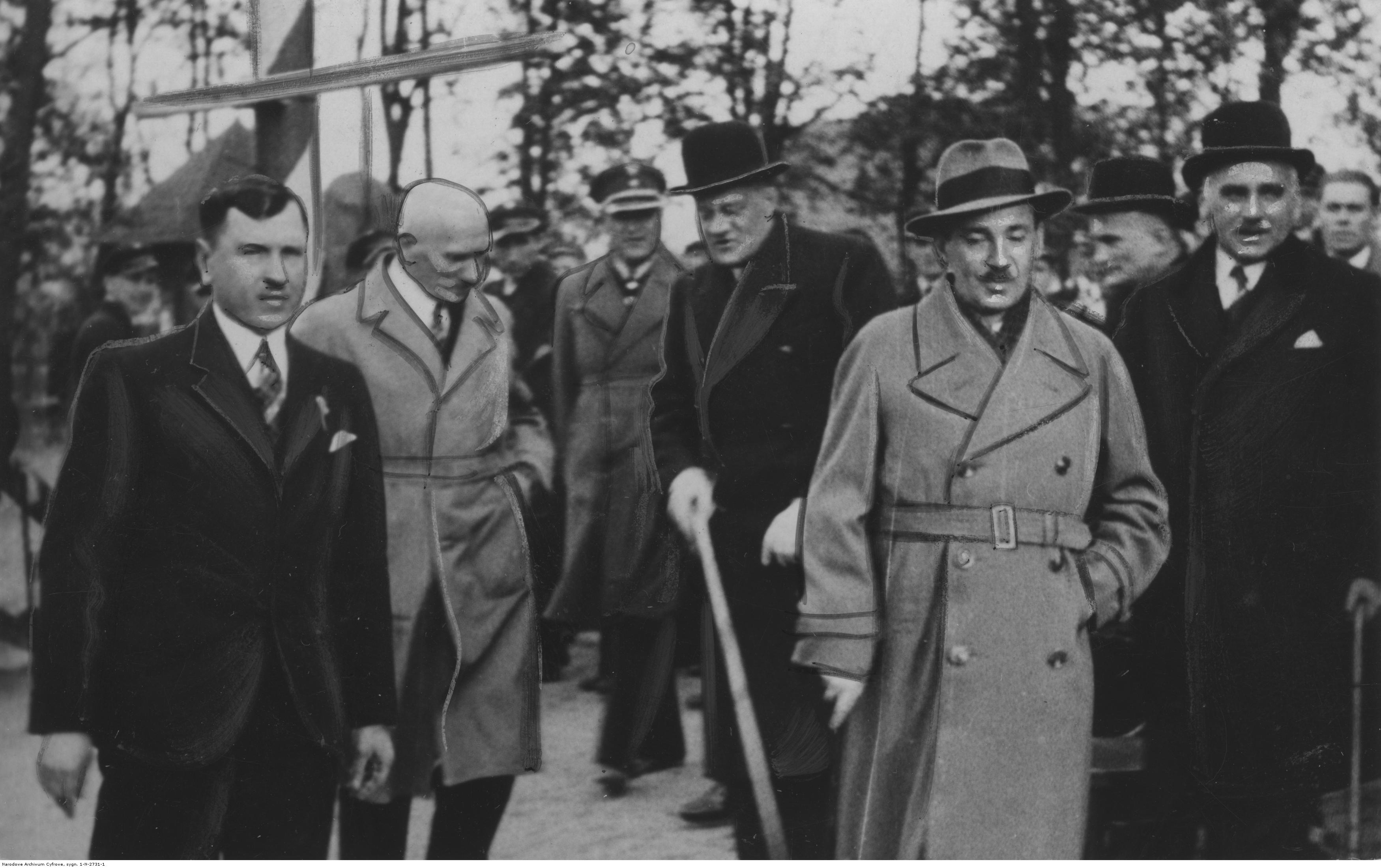 Minister wyznań religijnych i oświecenia publicznego Wacław Jędrzejewicz podczas zwiedzania przystani szkolnej w Kaliszu. Widoczni od prawej: prezydent Kalisza Kazimierz Sulistrowski, minister Wacław Jędrzejewicz, starosta kaliski Henryk Ostaszewski, kurator szkolny Ignacy Pytlakowski i naczelnik przystani prof. Baworowski. Koncern Ilustrowany Kurier Codzienny - Archiwum Ilustracji. Sygnatura: 1-N-2731-1